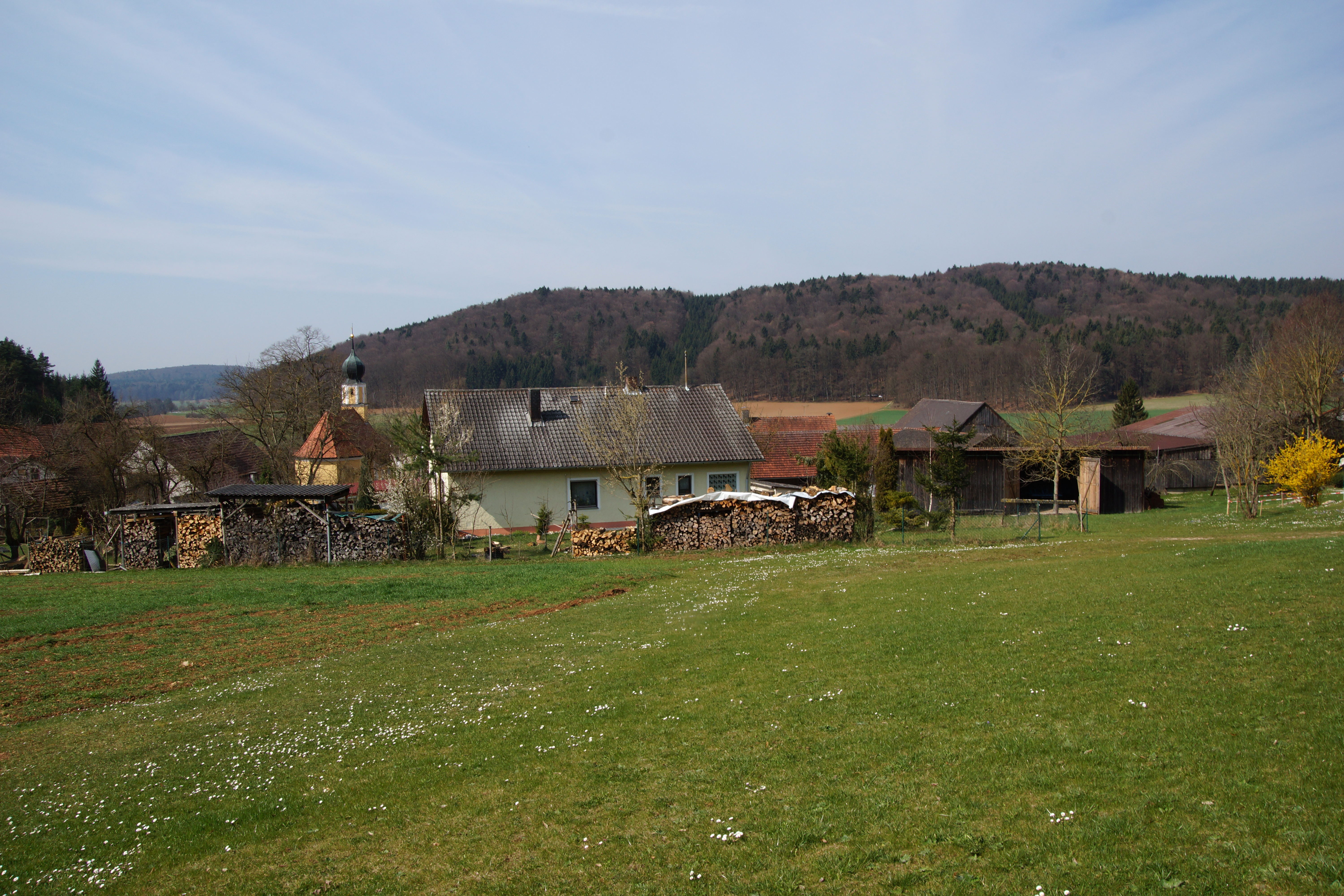 Freudenricht bei Velburg in der Oberpfalz